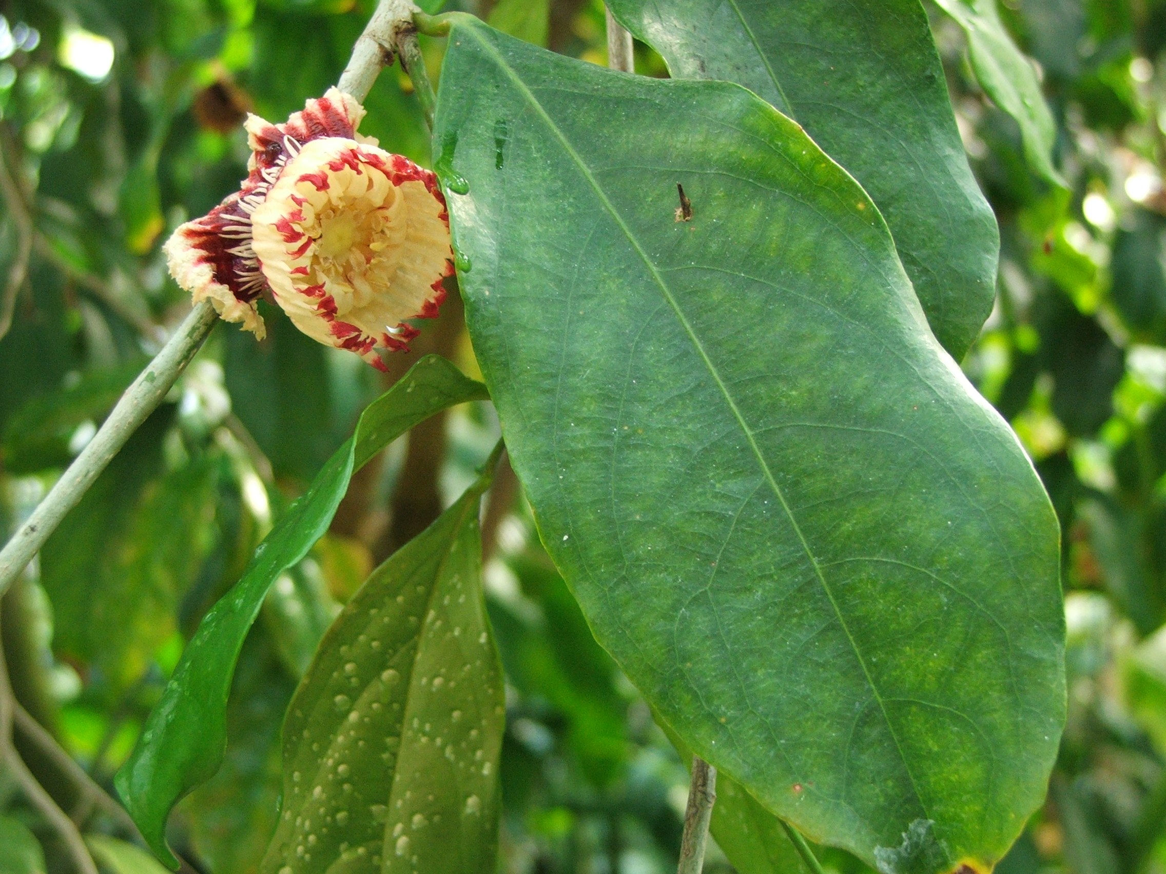 Napoleonaea imperialis P. Beauv. - MTA Botanic Garden Vácrátót, Hungarysyn.: Napoleona imperialis ref.